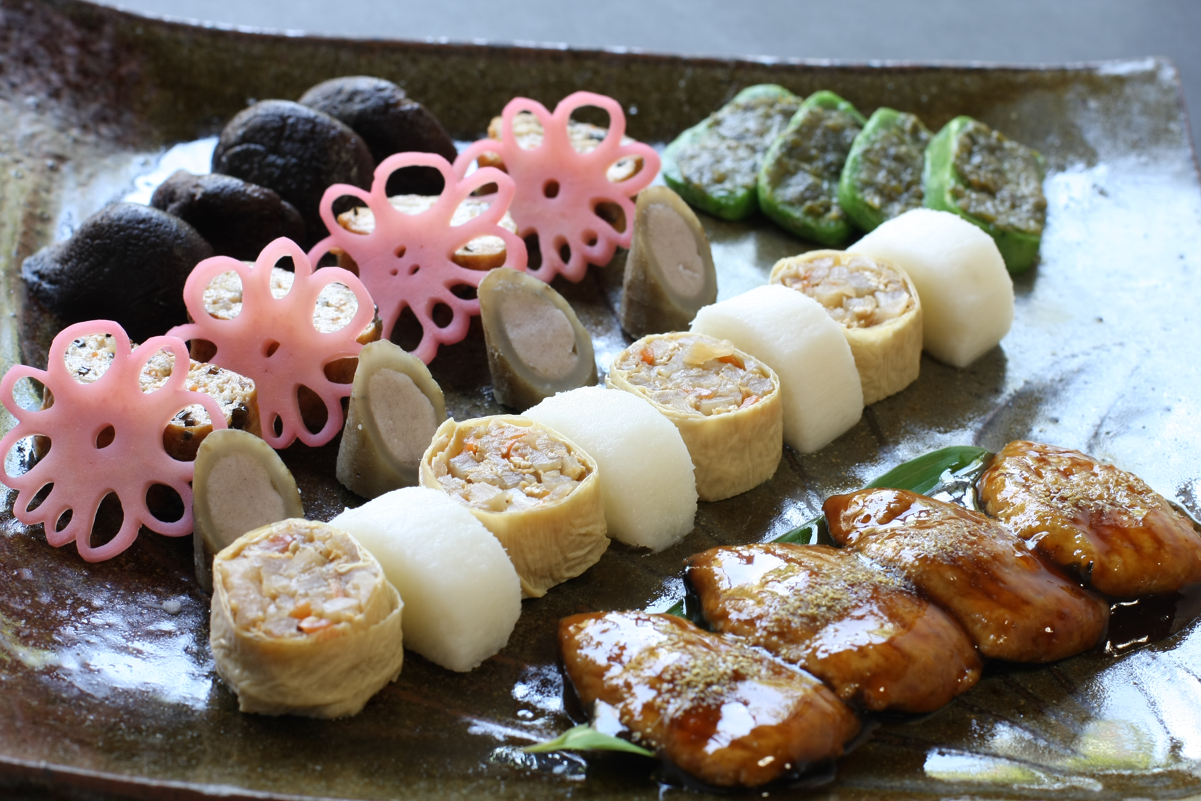 西願寺で提供している普茶料理